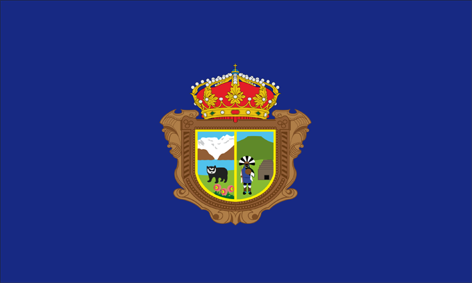 Bandera de Asunción